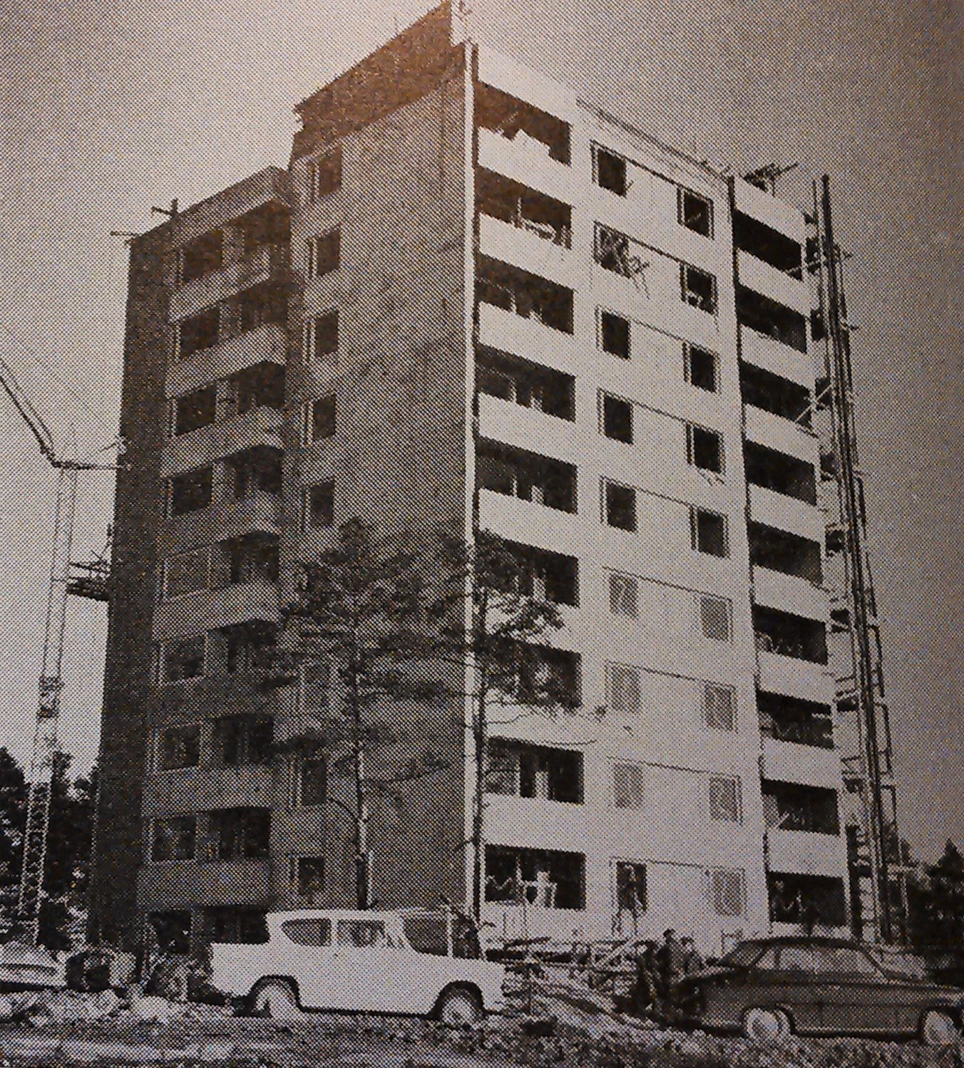 Lahden säästöhuippu uudelleen rakennettuna 1963